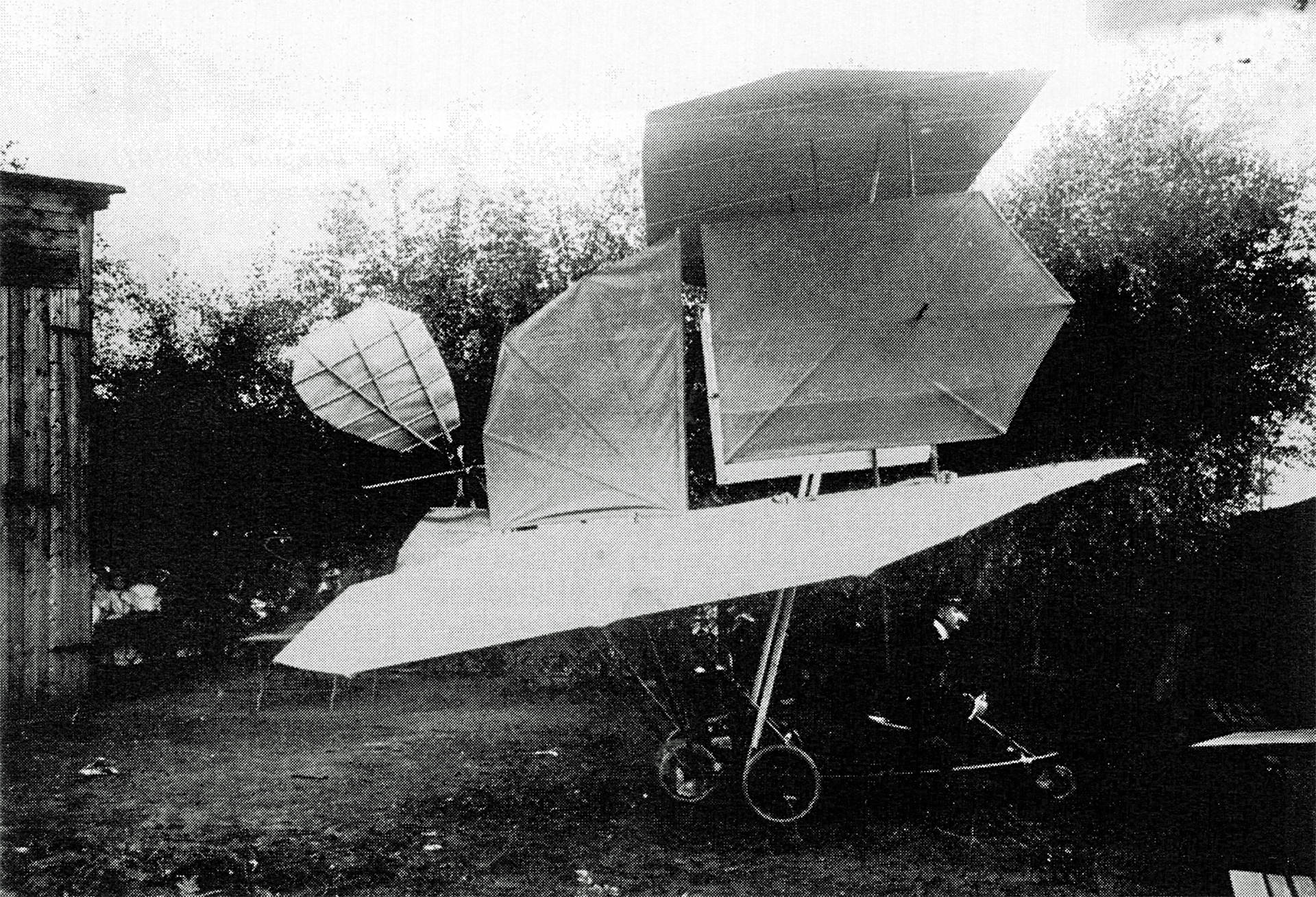 Der "Jatho-Drachen" im 2. Halbjahr 1907. Das Automobillenkrad, das Jatho umfasst, wurde kurz vor dem 20. August 1907 montiert, wie eine Zeitungsnotiz des Hannoverschen Anzeigers berichtet. Die "aus einem Eschenholzgerippe mit Blechüberzug bestehende Luftschraube" wurde danach im 2. Halbjahr 1907 durch einen "Magnaliumpropeller" (Aluminium-Legierung mit Magnesium) ersetzt, das Vorderrad brach bei späteren Startversuchen im Jahr 1907 ab und wurde durch eine Vorderachse mit zwei Rädern ersetzt, wie eine Notiz der Allgemeinen Automobil Zeitung vom 20. Dezember 1907 berichtet.